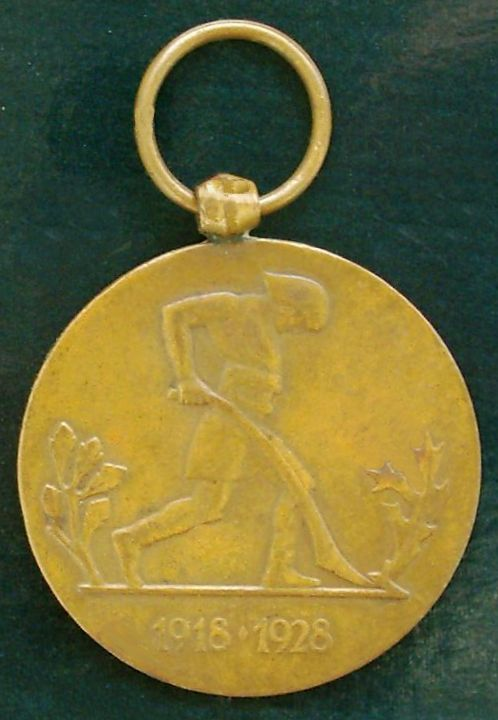 Medal X lecia odzyskania niepodległości